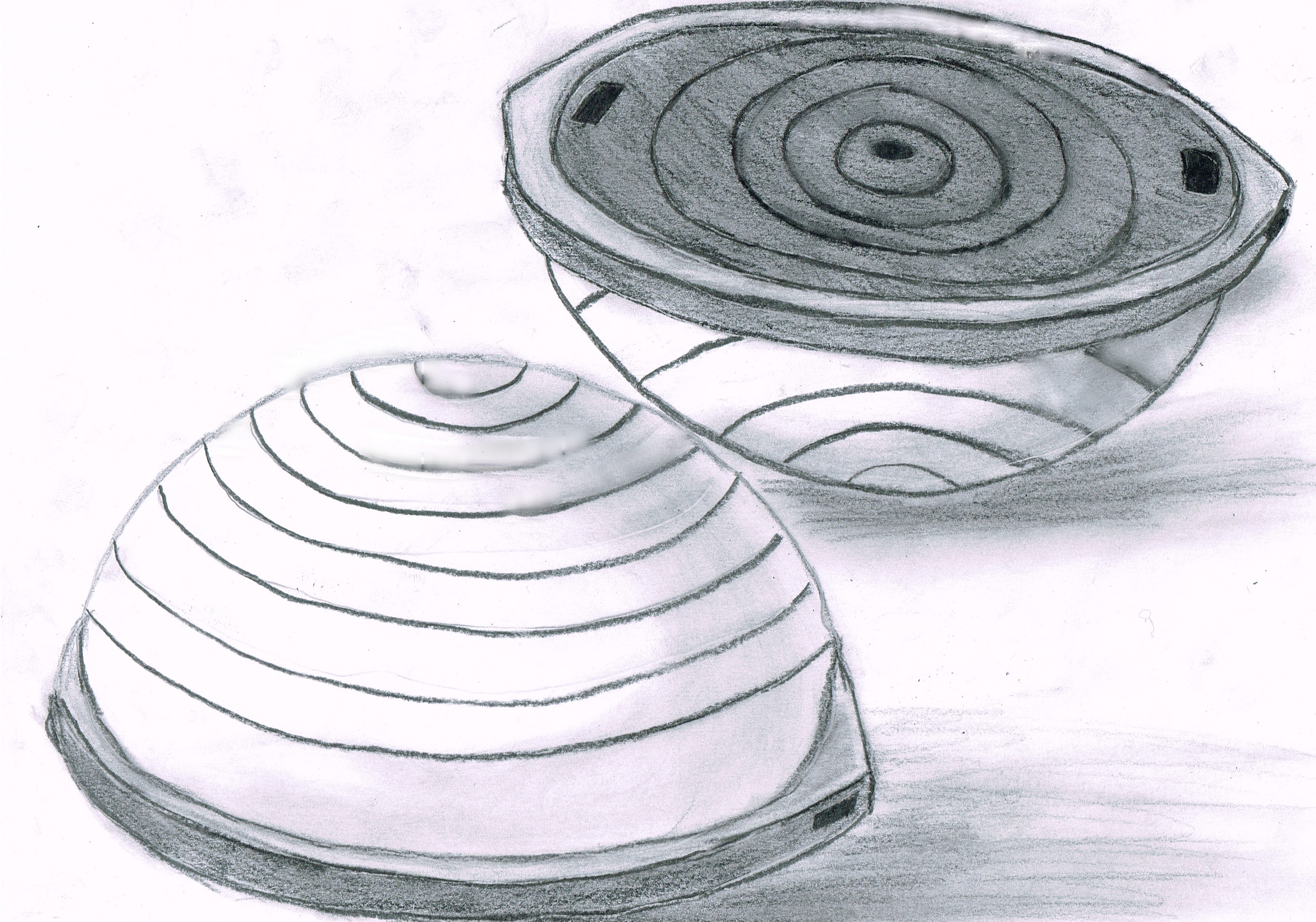 Das Sportgerät BOSU als Zeichnung.